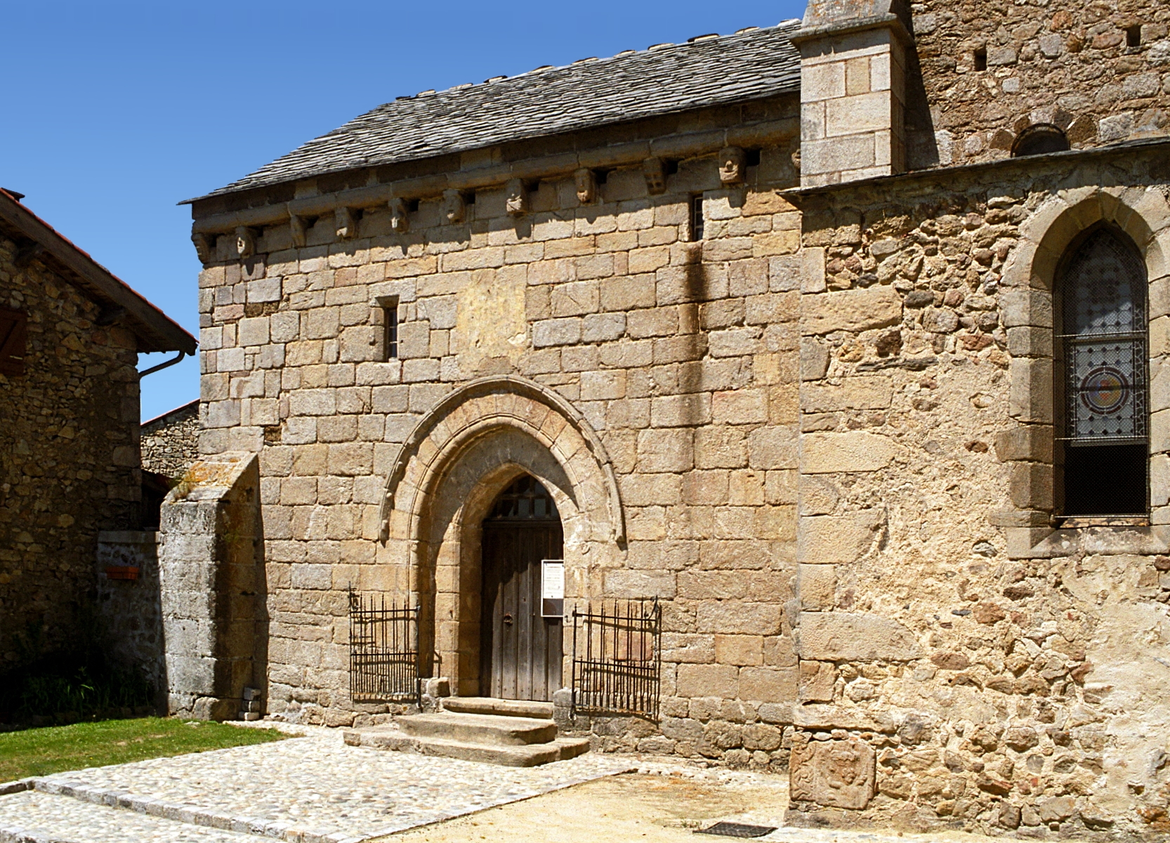 France - Auvergne - Haute-Loire - Église de Saint-Victor-sur-Arlanc